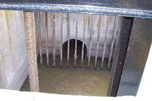 Pazo de muy gruesos de una EDAR